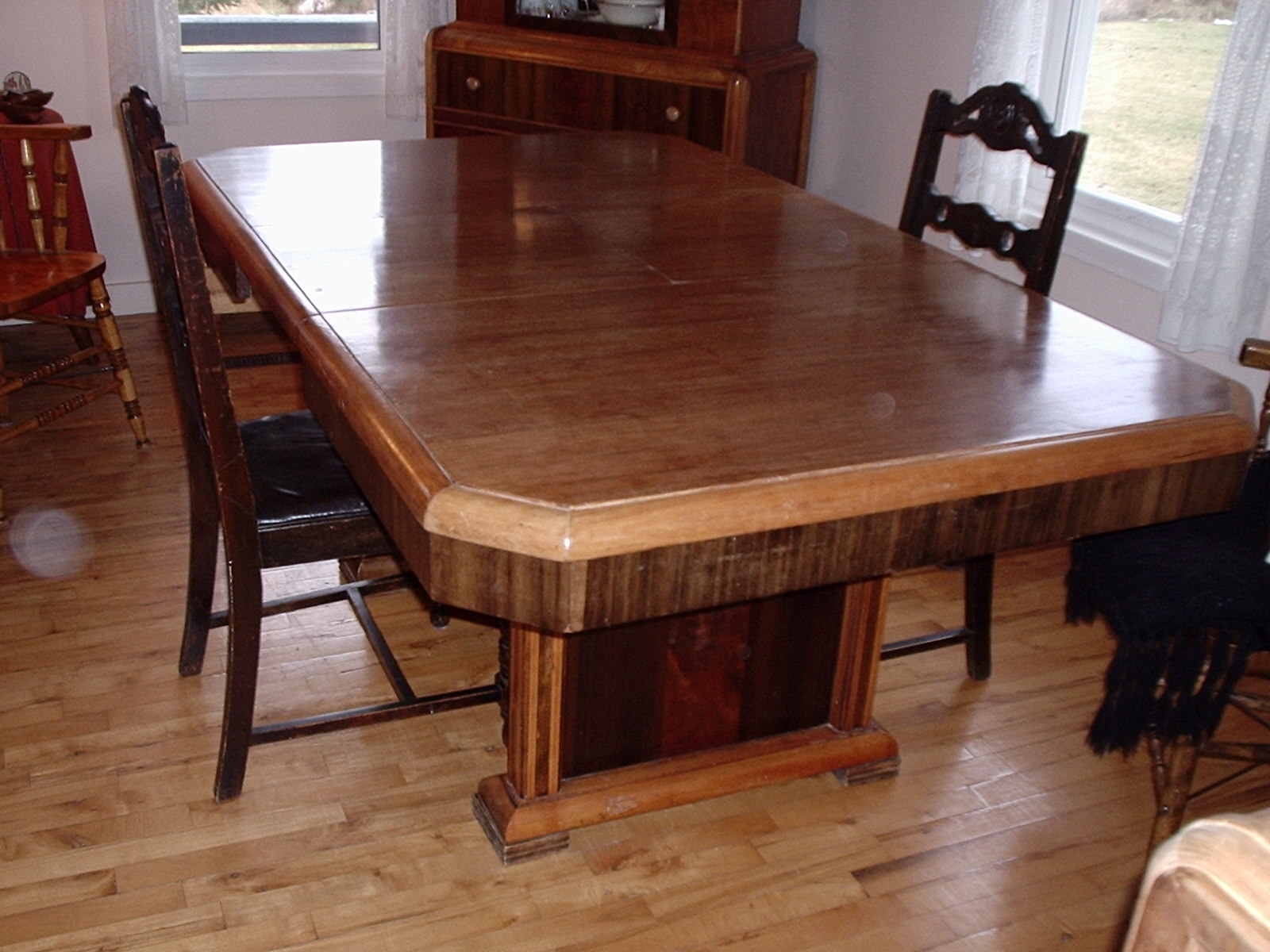 prise par moi-même Utilisateur:Wilrondeau